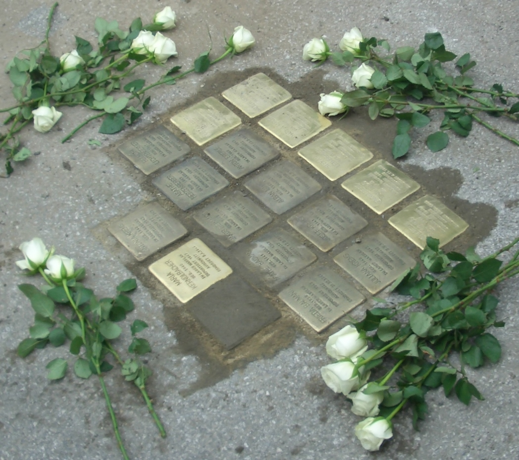 Hörmahnmal am Schwarzgrabenweg Salzburg